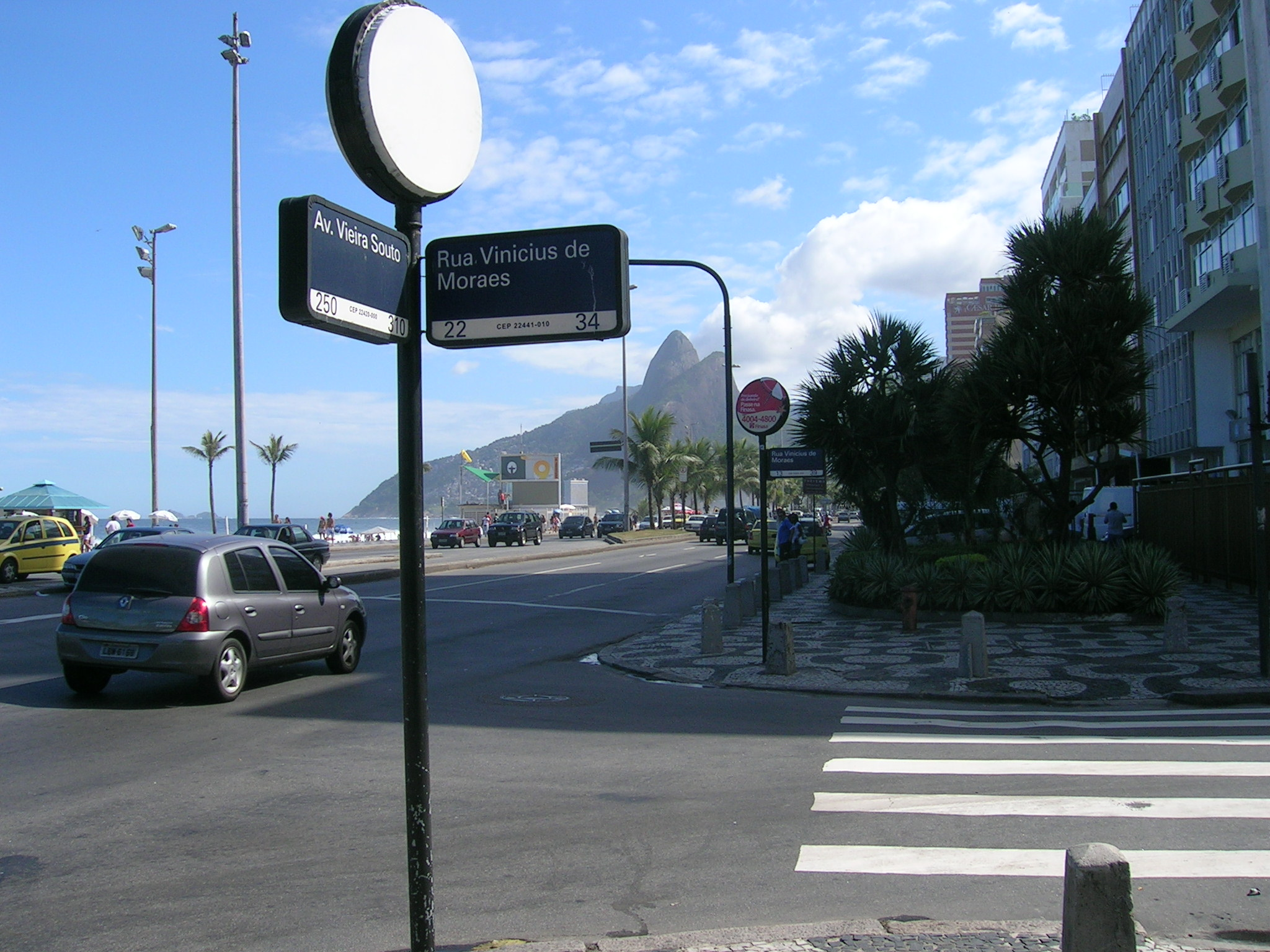 Rua Vinicius de Moraes, Ipanema, Rio de Janeiro.